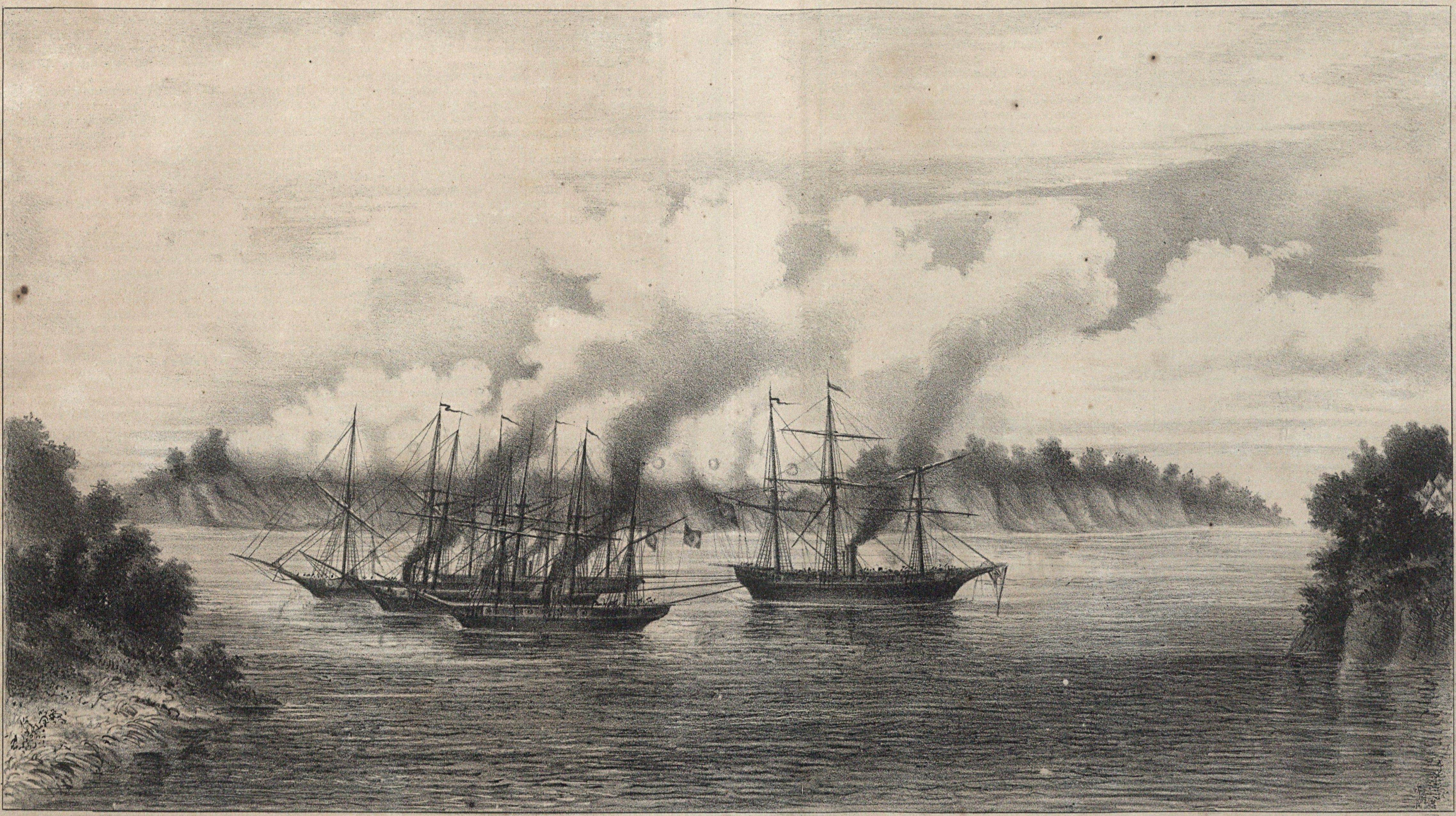 Legenda Original: Episódios do dia 13 de Junho de 1865. Combate Naval de Riachuelo. Os vapores Ypiranga (com. Alvaro de Carvalho), Mearim (com. Barboza), Araguary (com. Hoonholtz) e Iguatemy (com. Coimbra), trabalhando em desencalhar o Jequitinhonha, quando ás 2 horas da tarde as baterias do Riachuelo romperão de novo o fogo sobre elles, sendo respondido de modo tal pela artilharia de bordo que às 3 horas tiverão os inimigos de calar-se.